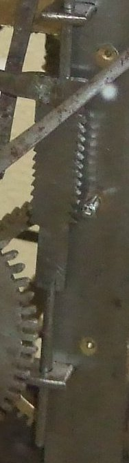 gerade ausgeführter Rechen einer Comtoise-Uhr